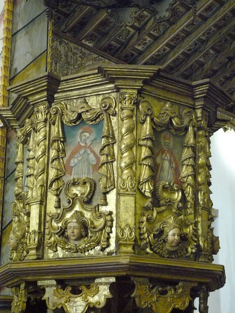 Fotos tomadas por mí, a inicios del año 2008 iglesia de yaguaron